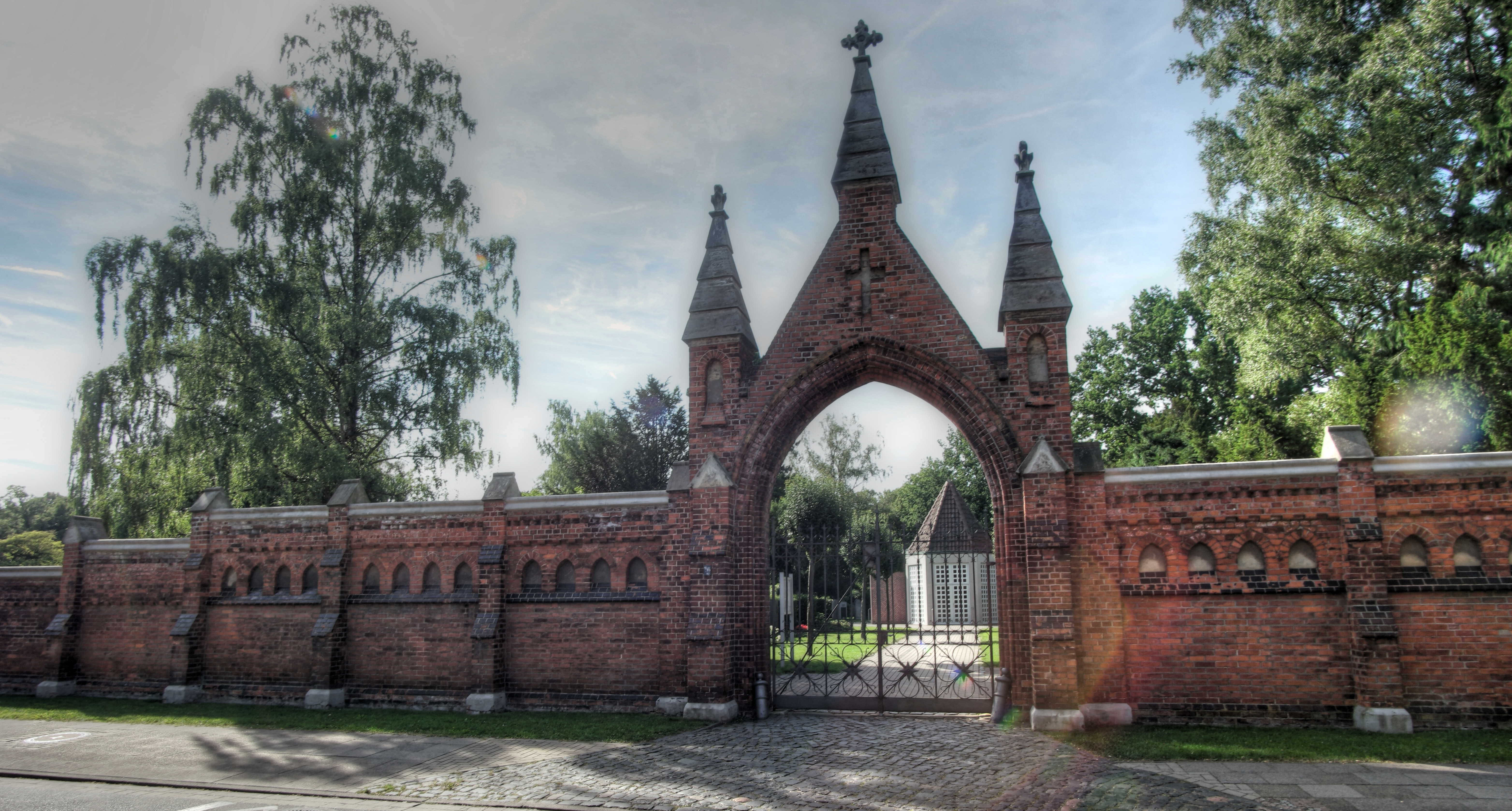 Mauer und Eingang des Stadtfriedhof Nackenberg Hannover Kleefeld Blumhardtstraße 10